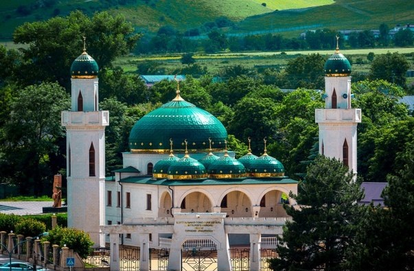 Адыгэбзэ: Хьбэз мэжджыт